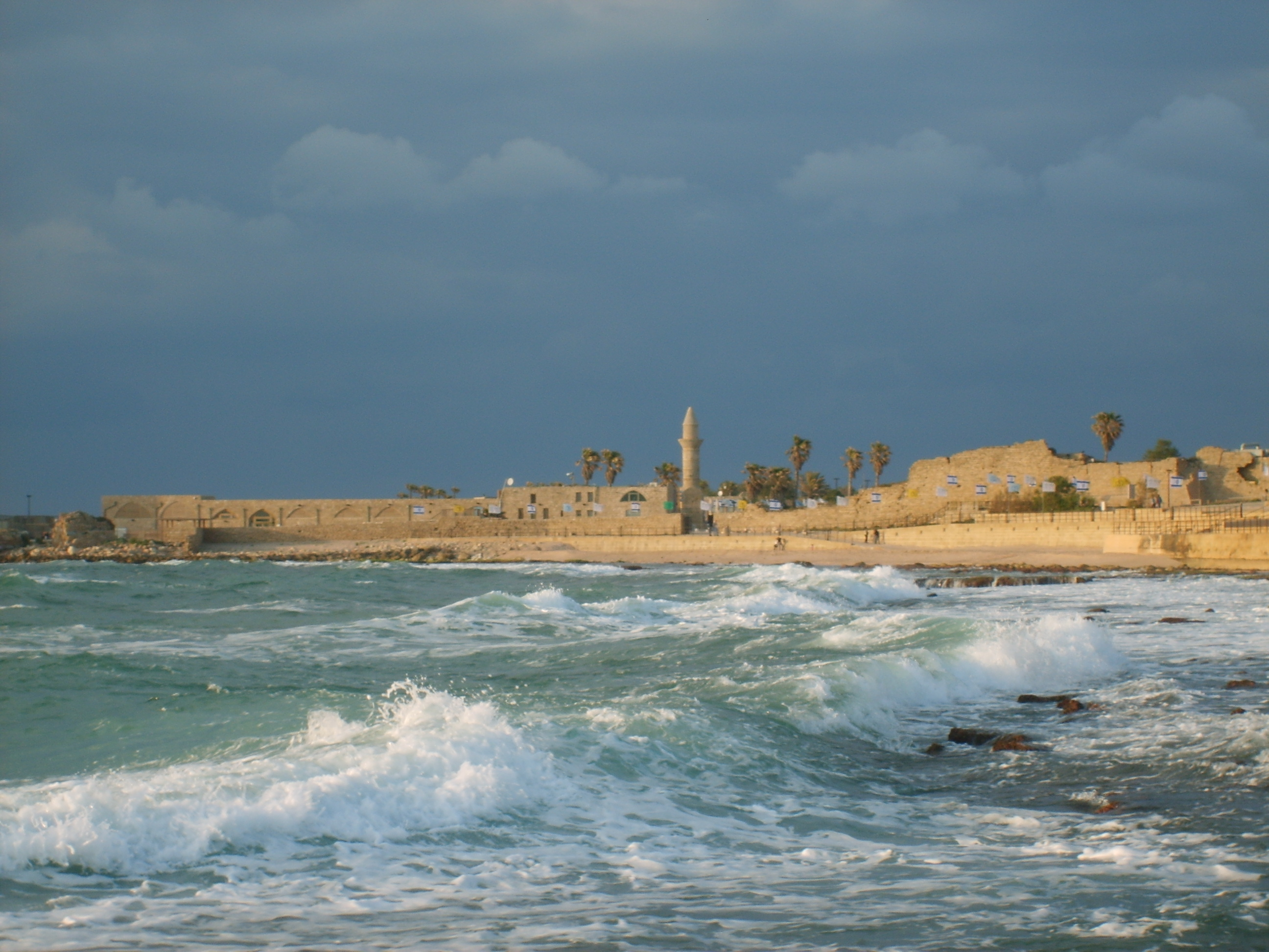 Blick auf Cäsarea Maritima.